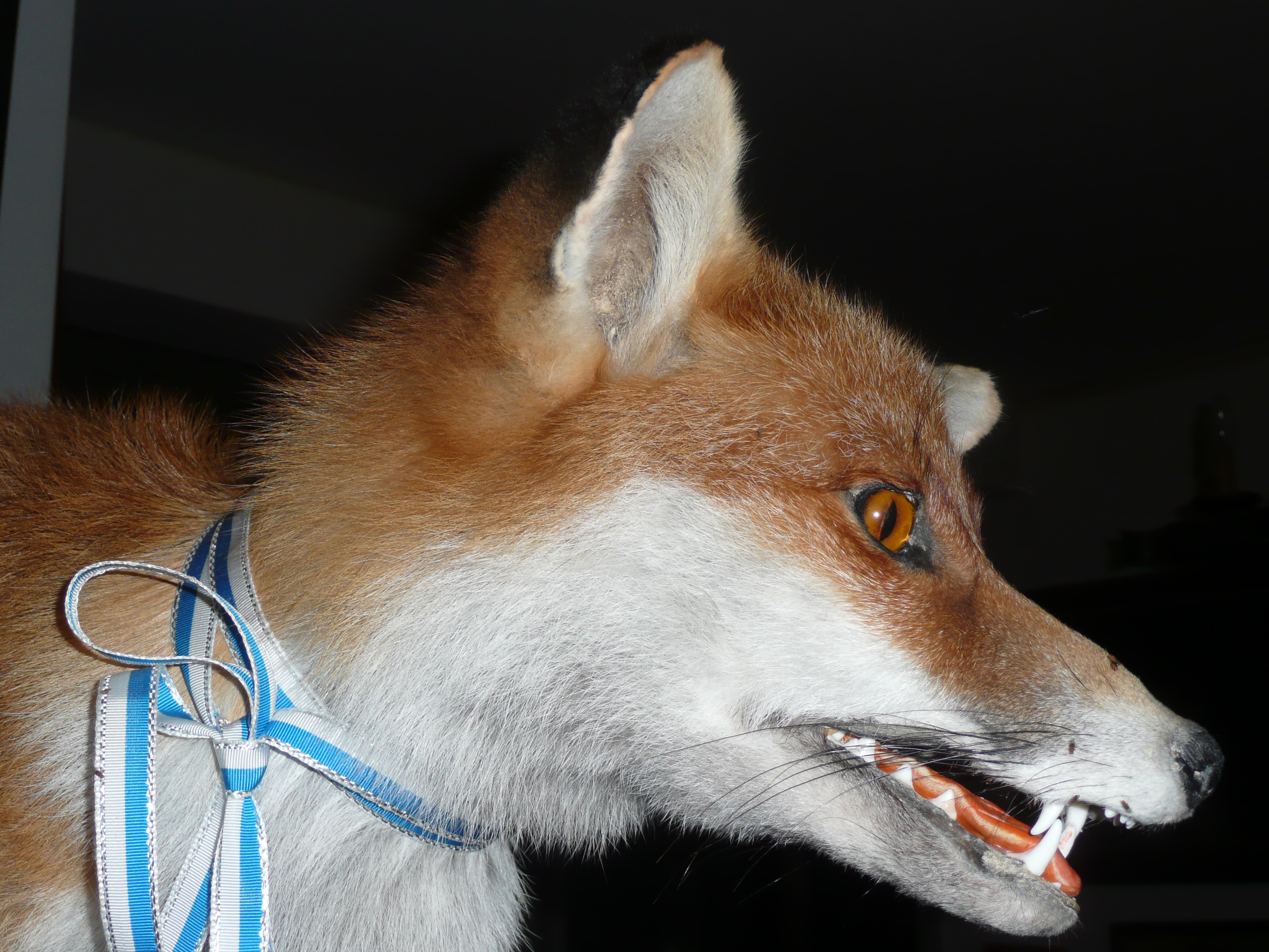 Fuchs mit den Farben der Utonia Zürich